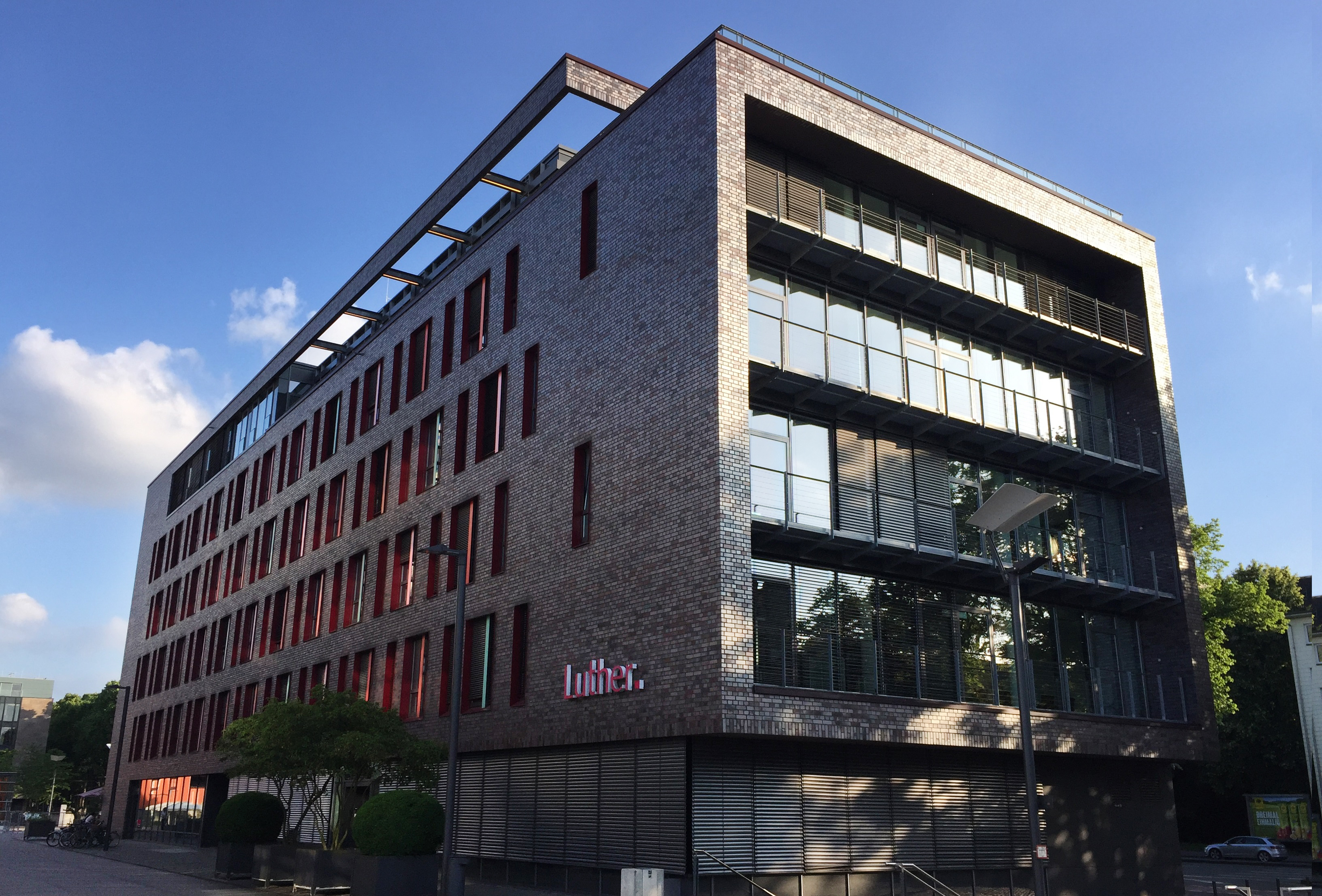 Das Baufeld21 auch "Luthergebäude" genannt.